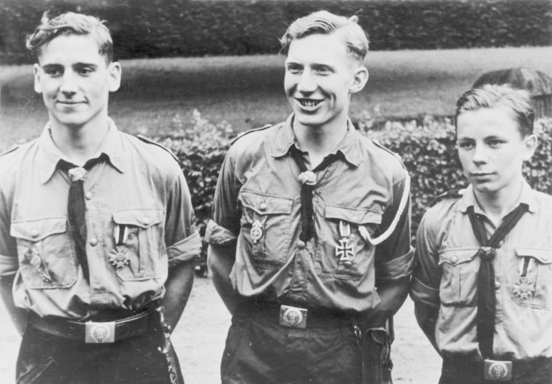 Tapfere Hamburger HJ Hitler-Jungen, die sich bei den Luftangriffen auf Hamburg wie Soldaten bewährten. Aufnahme: Reichsbildstelle der HJ/Soltmann